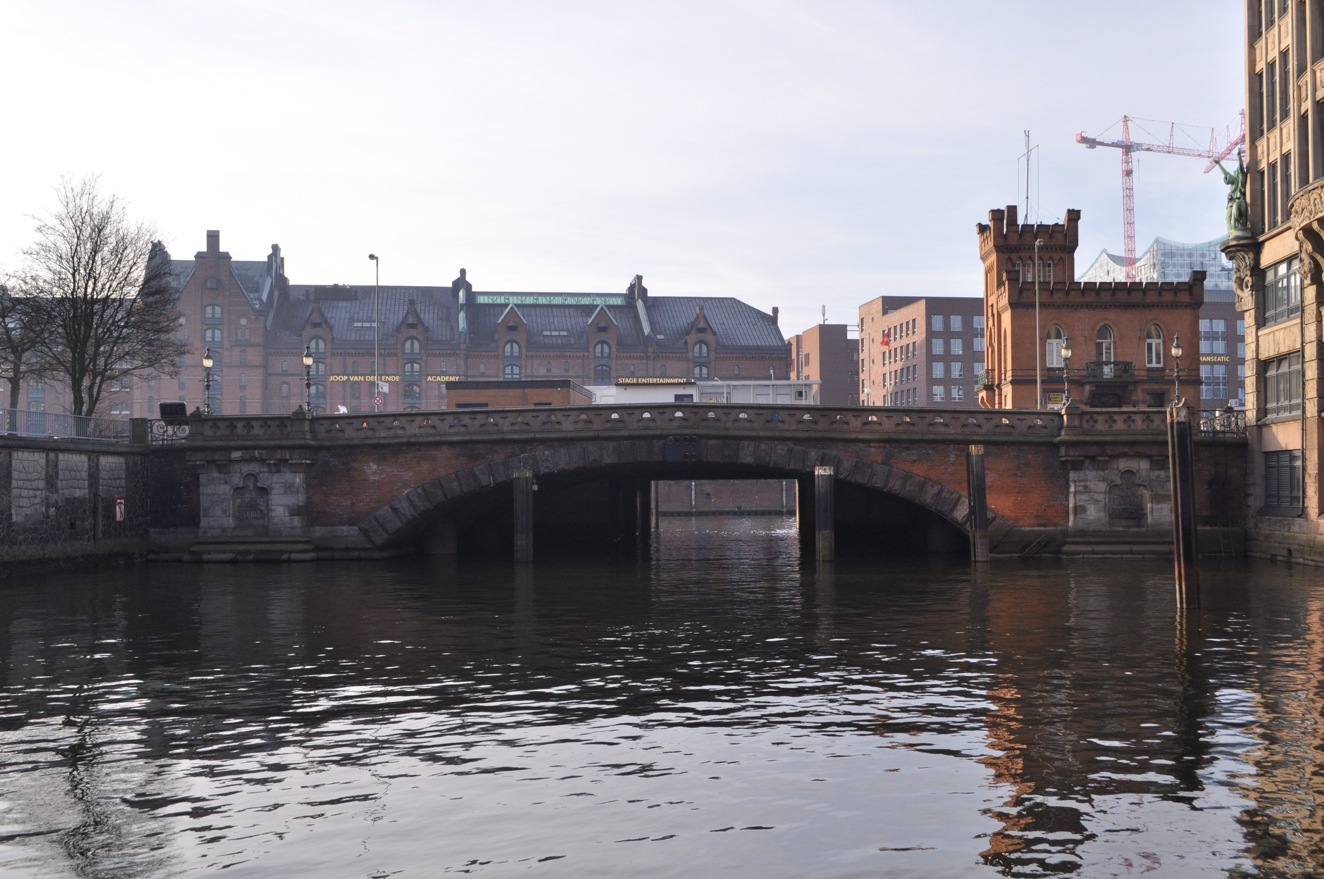 Die Hohe Brücke an der Mündung des Nikolaifleets in den Zollkanal in Hamburg-Altstadt.